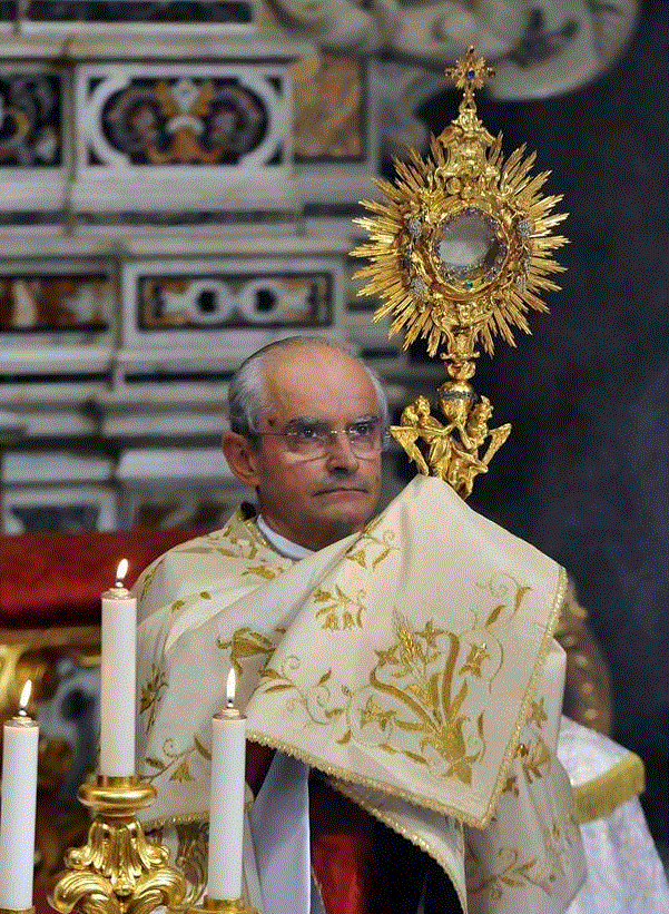 aiello